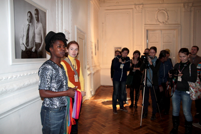 Занеле Мухоли на кинофестивале "Бок о бок"